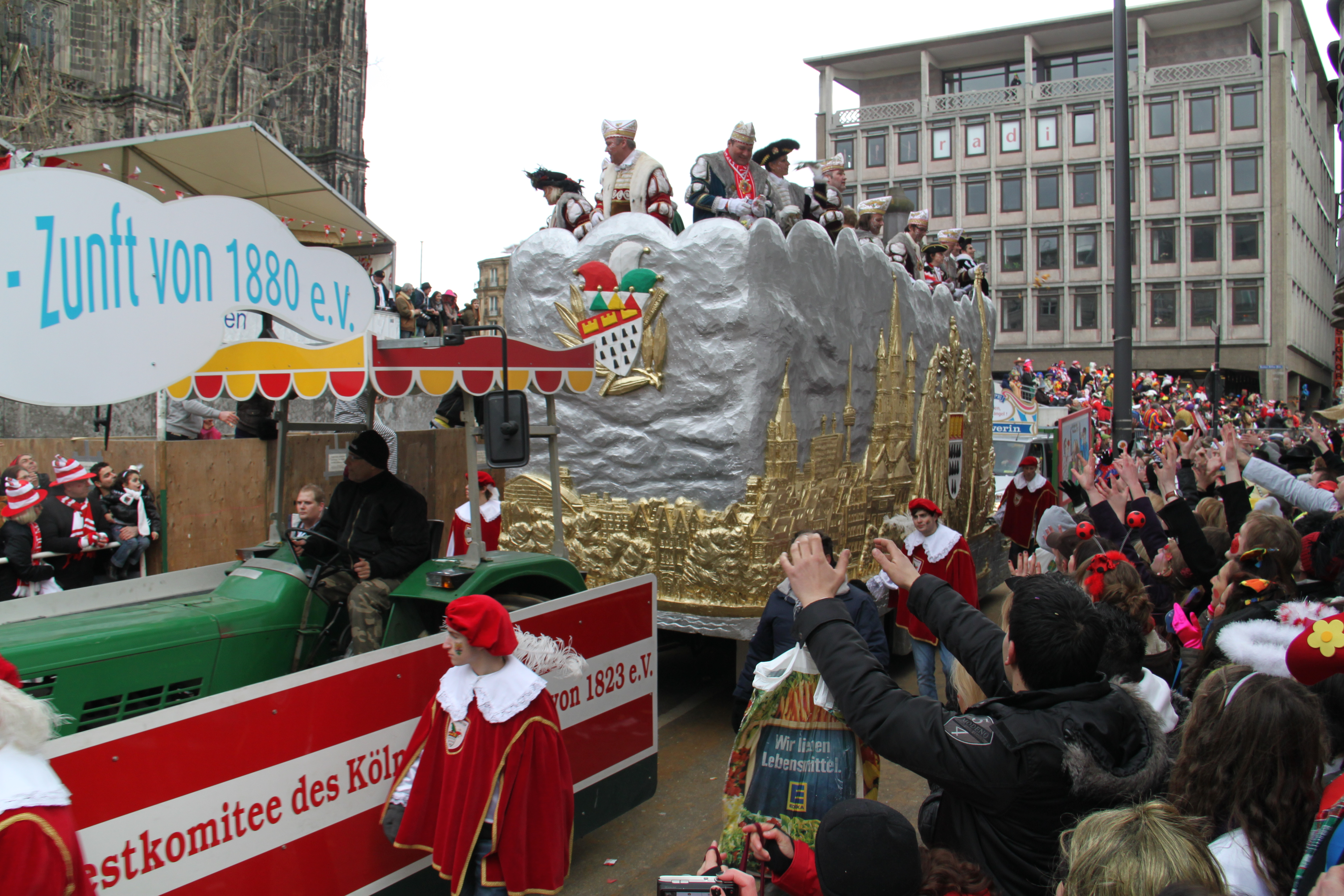 Rosenmontagszug Köln 2012